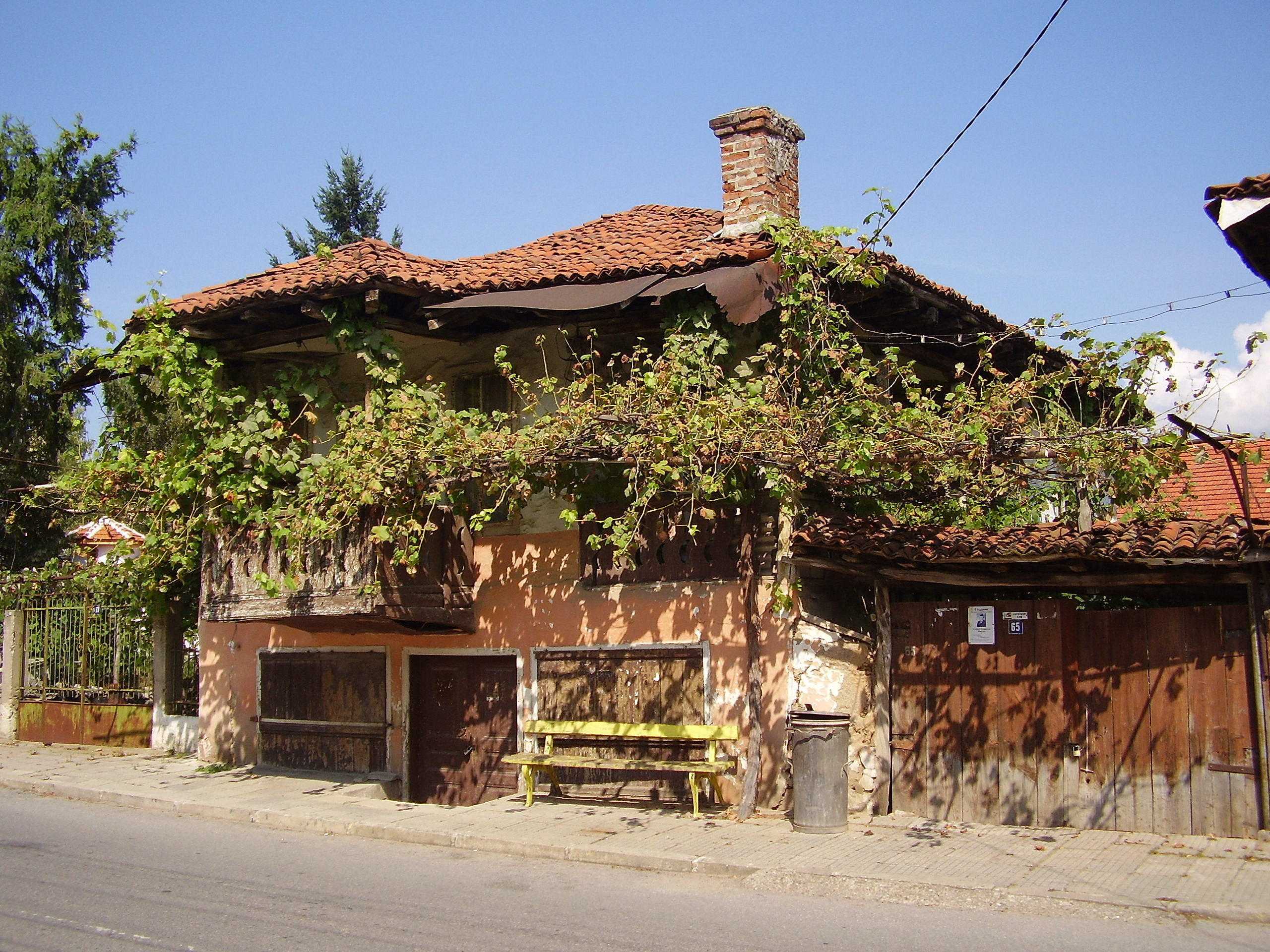 с.Соволяно